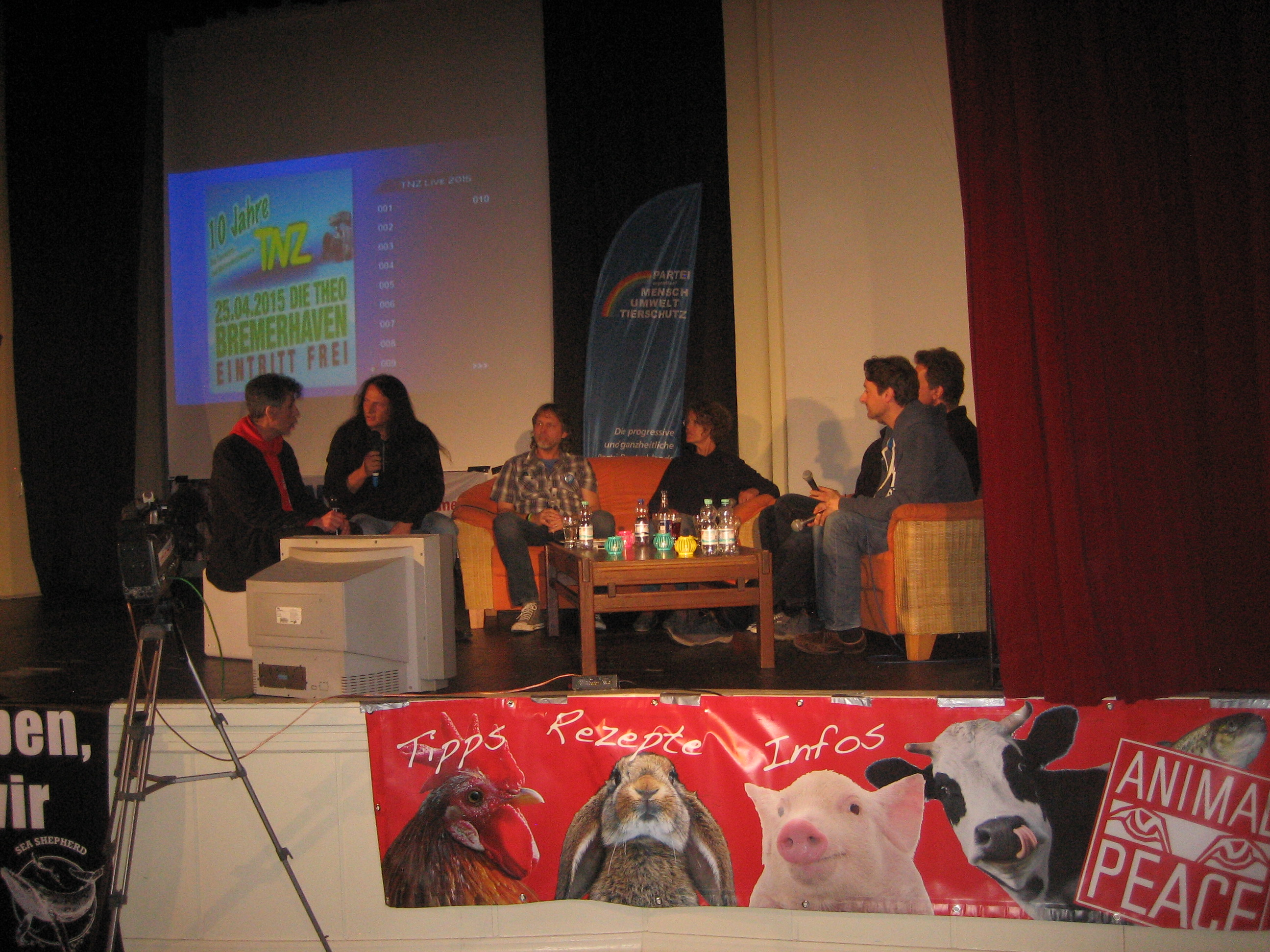 Diskussionsveranstaltung 10 Jahre tnz in Bremerhaven